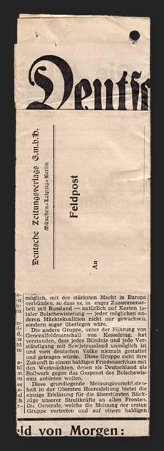 Ausgabe der Propagandazeitschrift "Das Neue Deutschland", vorbereitet für die Operation "Cornflakes", 1944